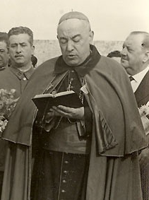 José María Bueno Monreal, cardenal arzobispo de Sevilla (1957-1982) This file has been extracted from another file: José María Bueno Monreal.jpg